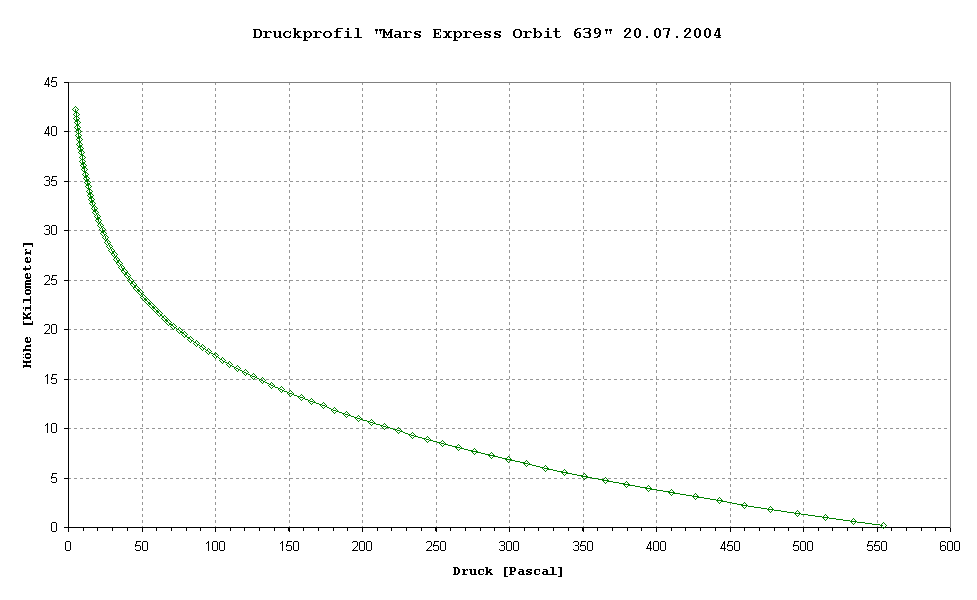 Druckprofil